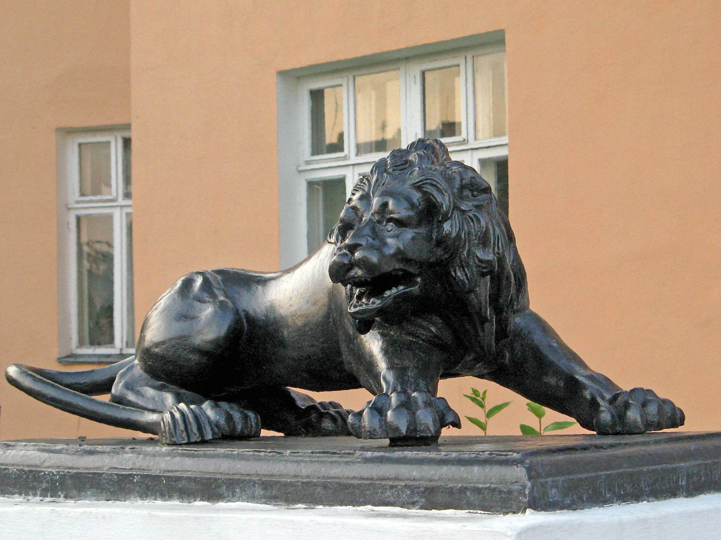 Присутственные места: площадь Ленина, 2, Петрозаводск, Карелия